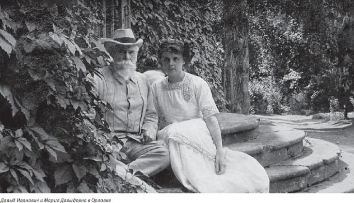 Генерал-лейтенант Давид Иванович Орлов (1840-1916) с дочерью Марией Давыдовной.